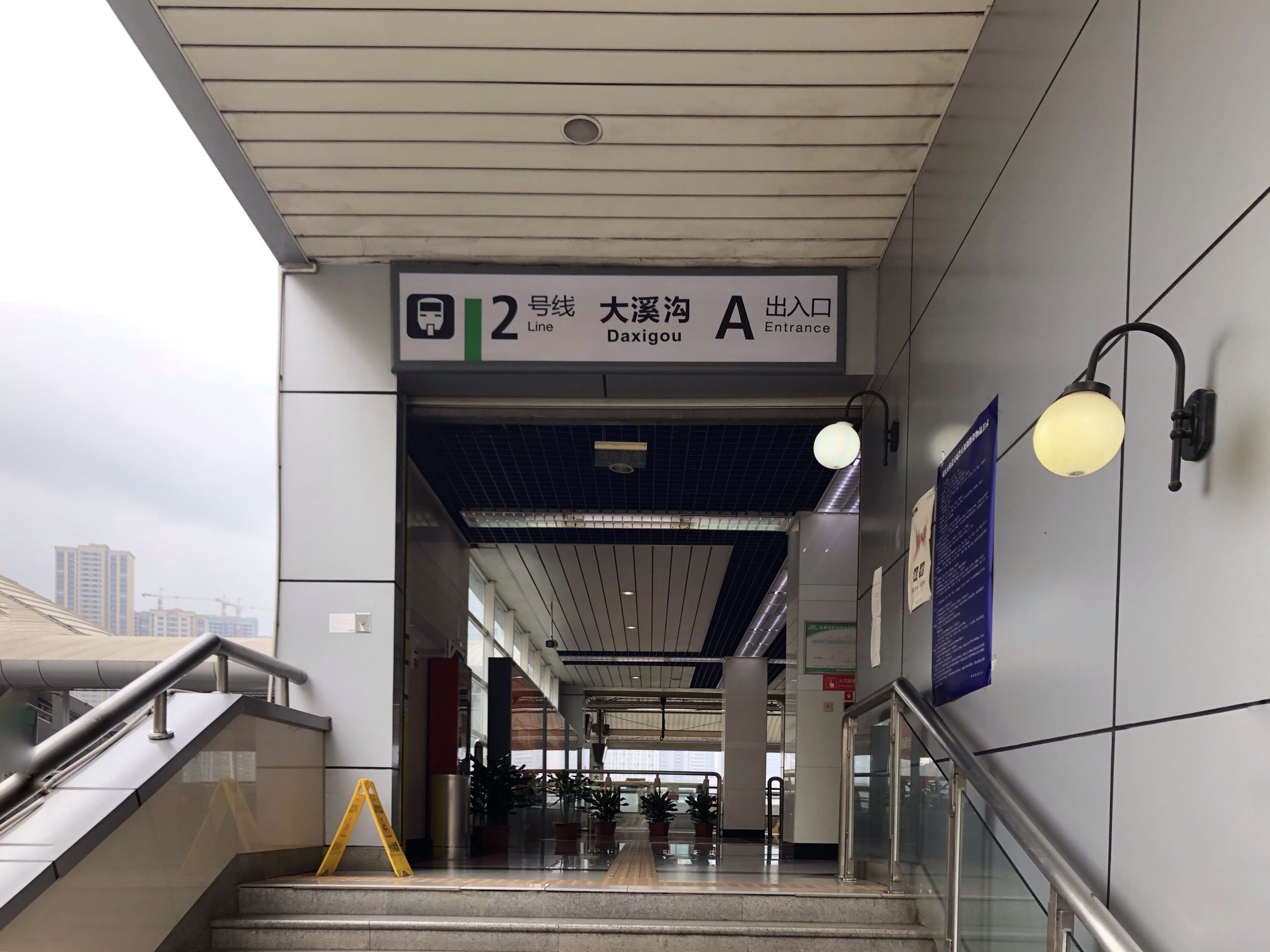 中文（中国大陆）: 2号线大溪沟站A出口